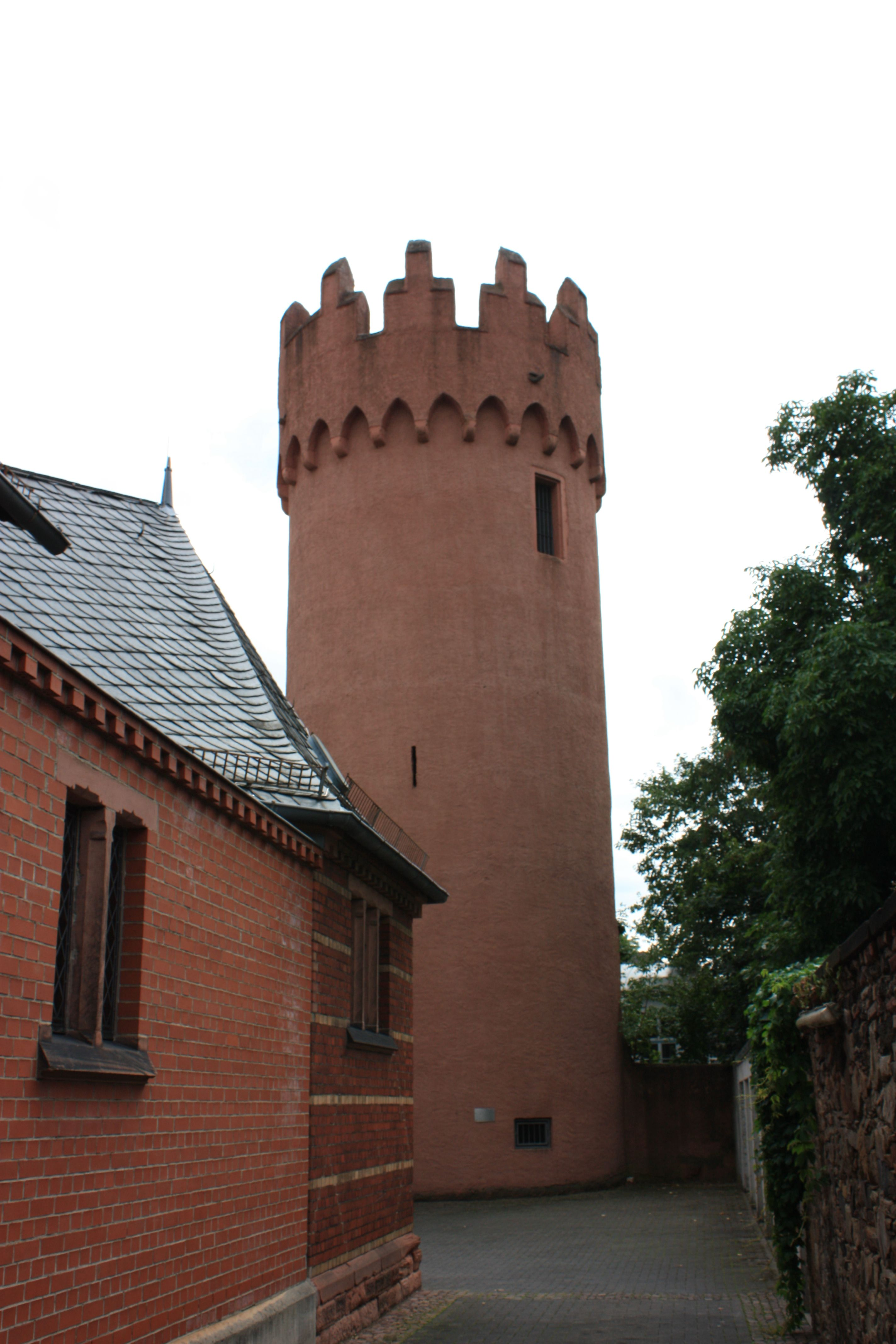 Der Rote Turm (Ersterwähnung 1396) in Friedberg diente als Gefängnis und ist der letzte erhaltene Turm der drei Türme der ehemaligen Stadtbefestigung.